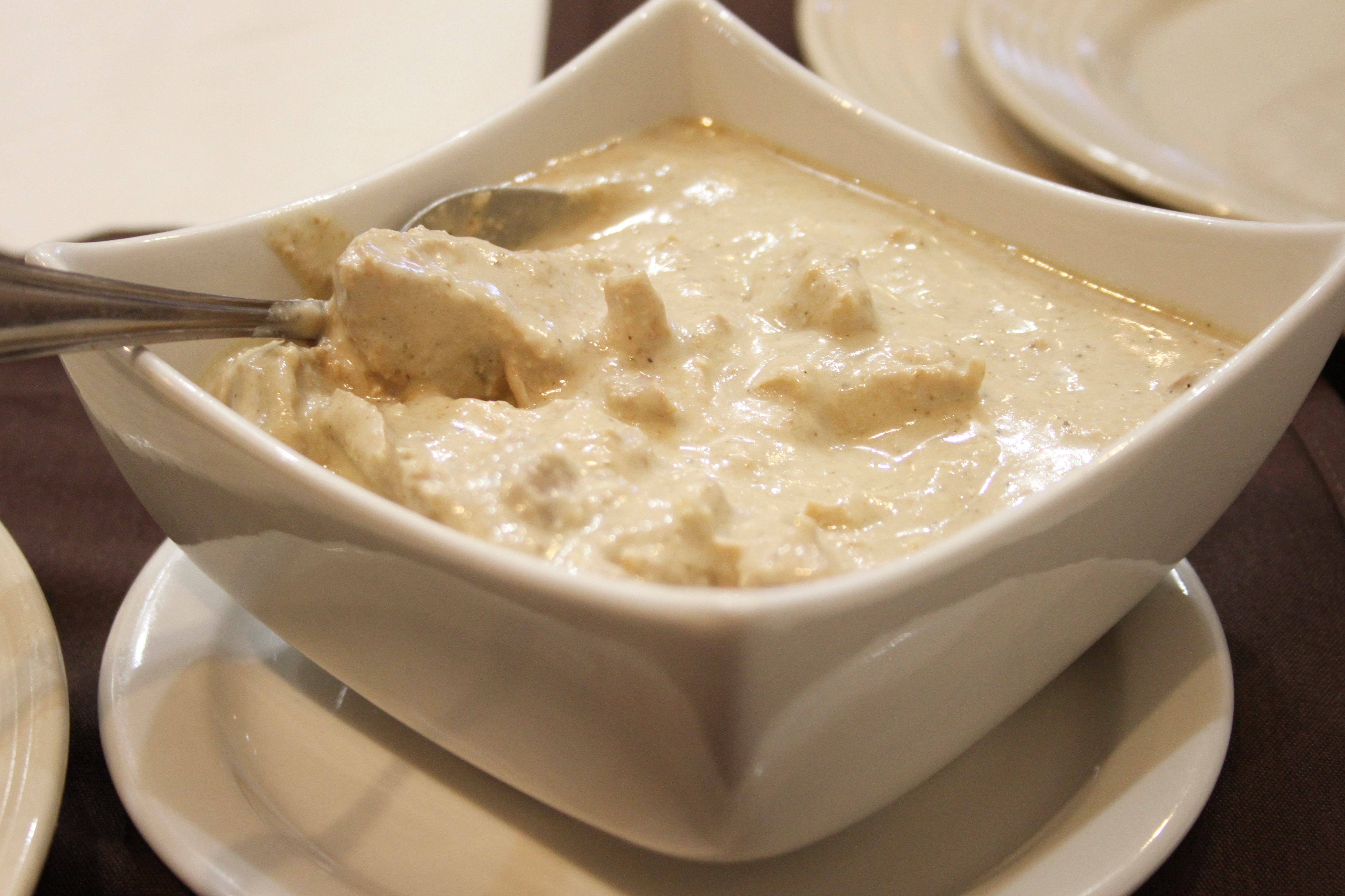 Satsivi Aragvi 832 Sheppard Ave W, Toronto